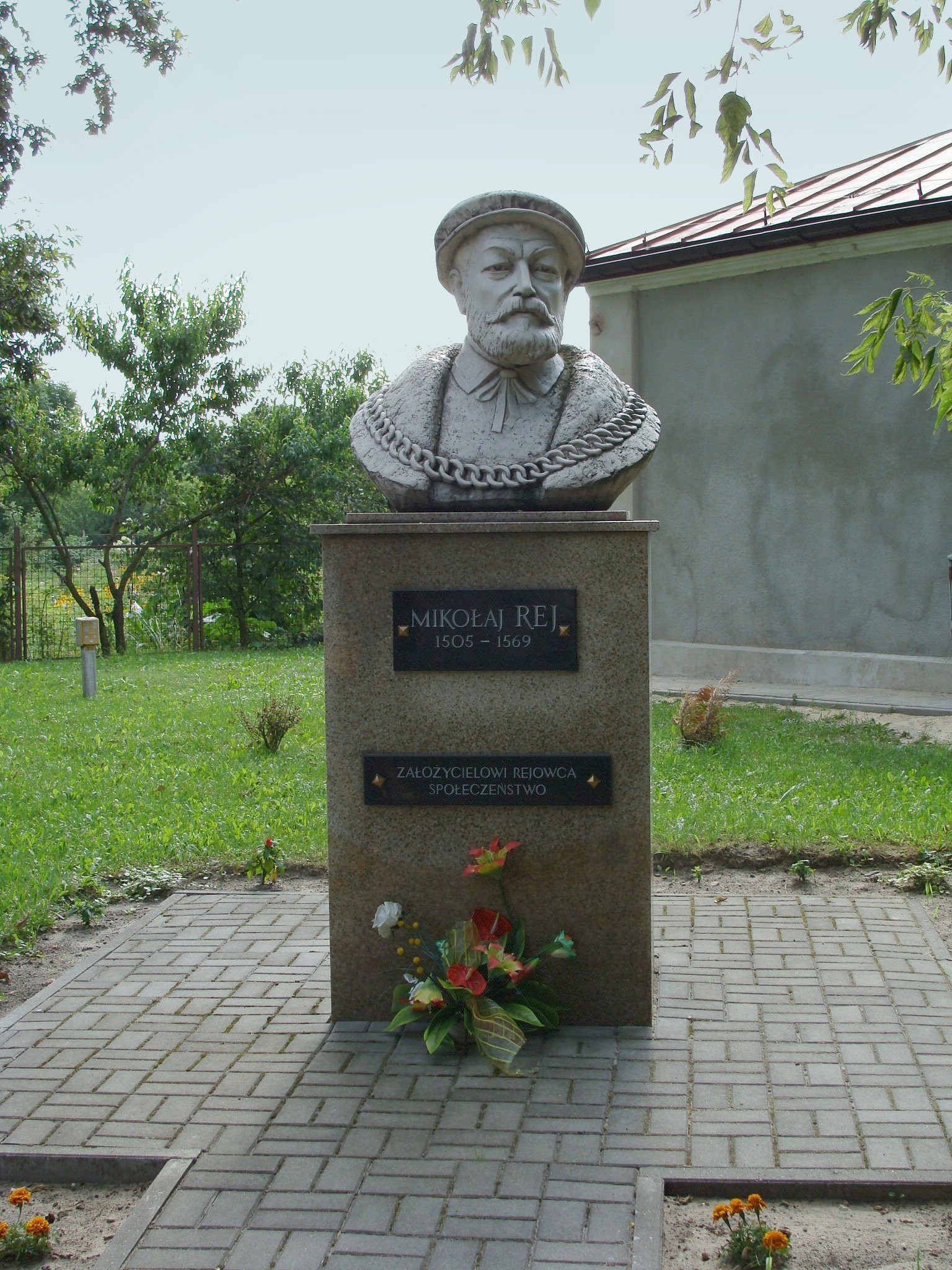 Pomnik Mikołaja Reja - założyciela Rejowca